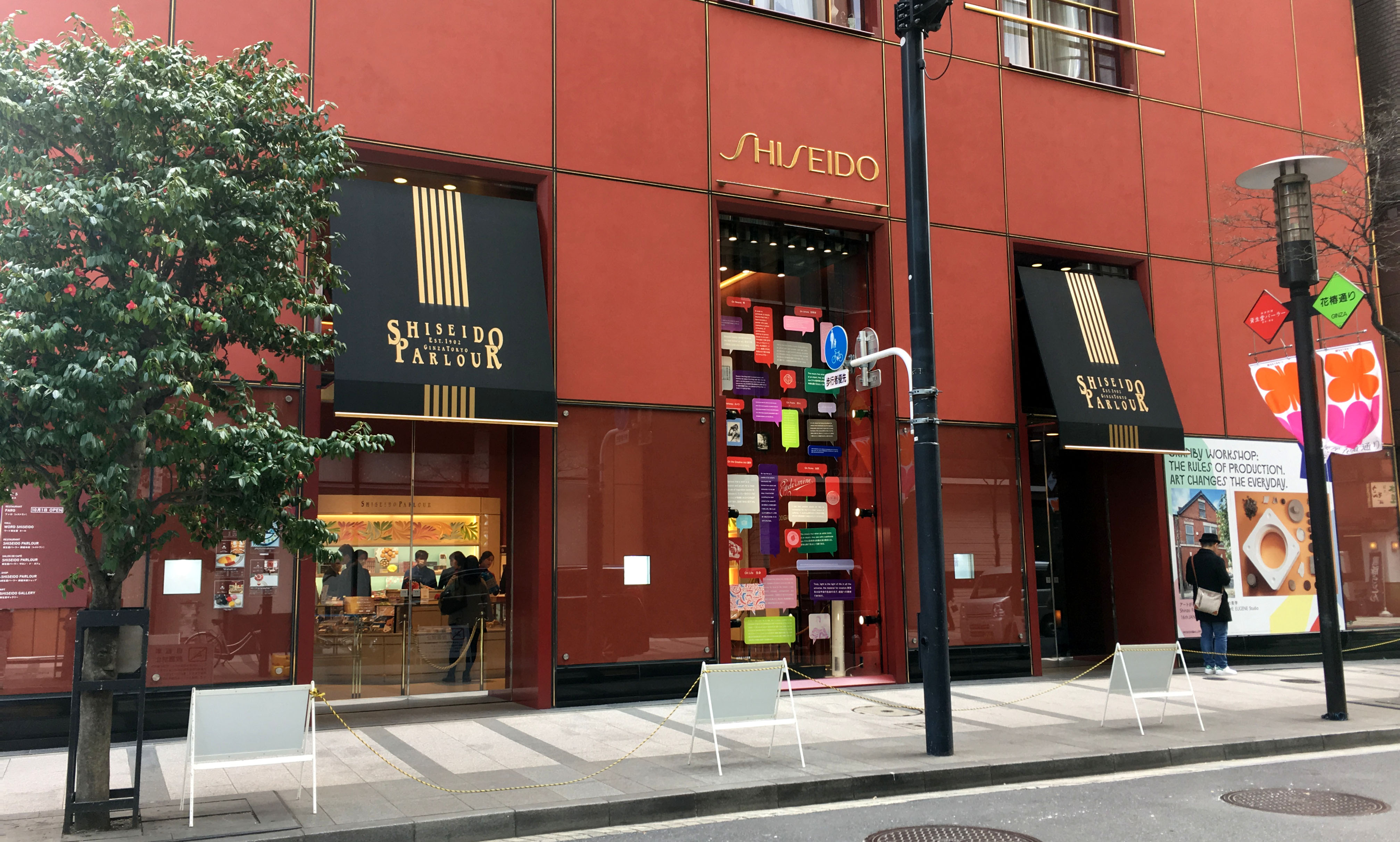 資生堂パーラー